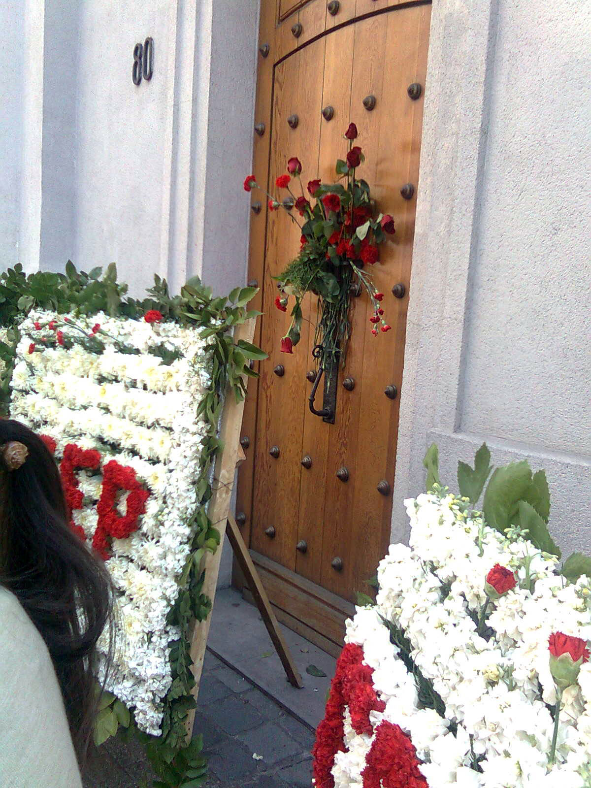 Morandé 80 es la dirección de una puerta ubicada en la fachada este del Palacio de La Moneda, en Santiago de Chile. Durante el Golpe de estado del 11 de septiembre de 1973, los restos mortales del presidente Salvador Allende fueron retirados por Morandé 80, y luego de la reconstrucción del palacio la puerta fue cubierta, por orden del entonces dictador Augusto Pinochet, para evitar su simbolismo. Sin embargo, después del regreso de la democracia en Chile, la dirección de esa puerta fue usada como símbolo por los ex partidarios de Allende.